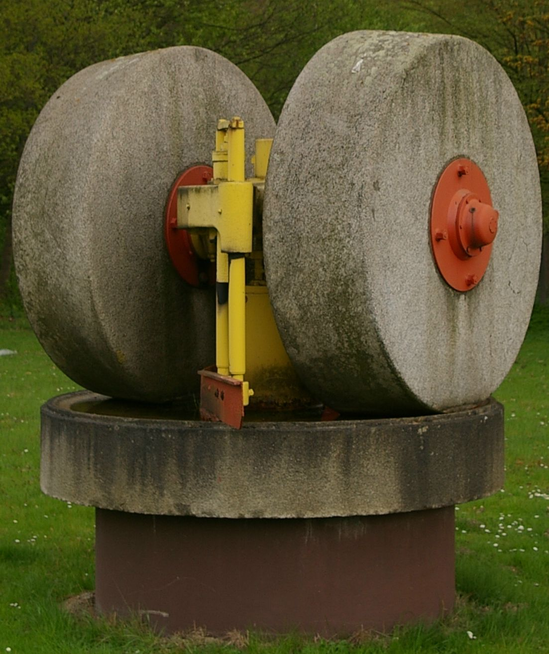 Innereien eines alten Kollergangs mit Beton-Mahlrollen. Ausstellungsstück in Beckum vor einem Werkstor.